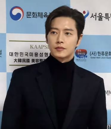 7일 오후 서울시 영등포구 여의도동 국회의사당 국회 헌정기념관에서 ‘2018 제8회 대한민국한류대상’ 시상식 열렸다.